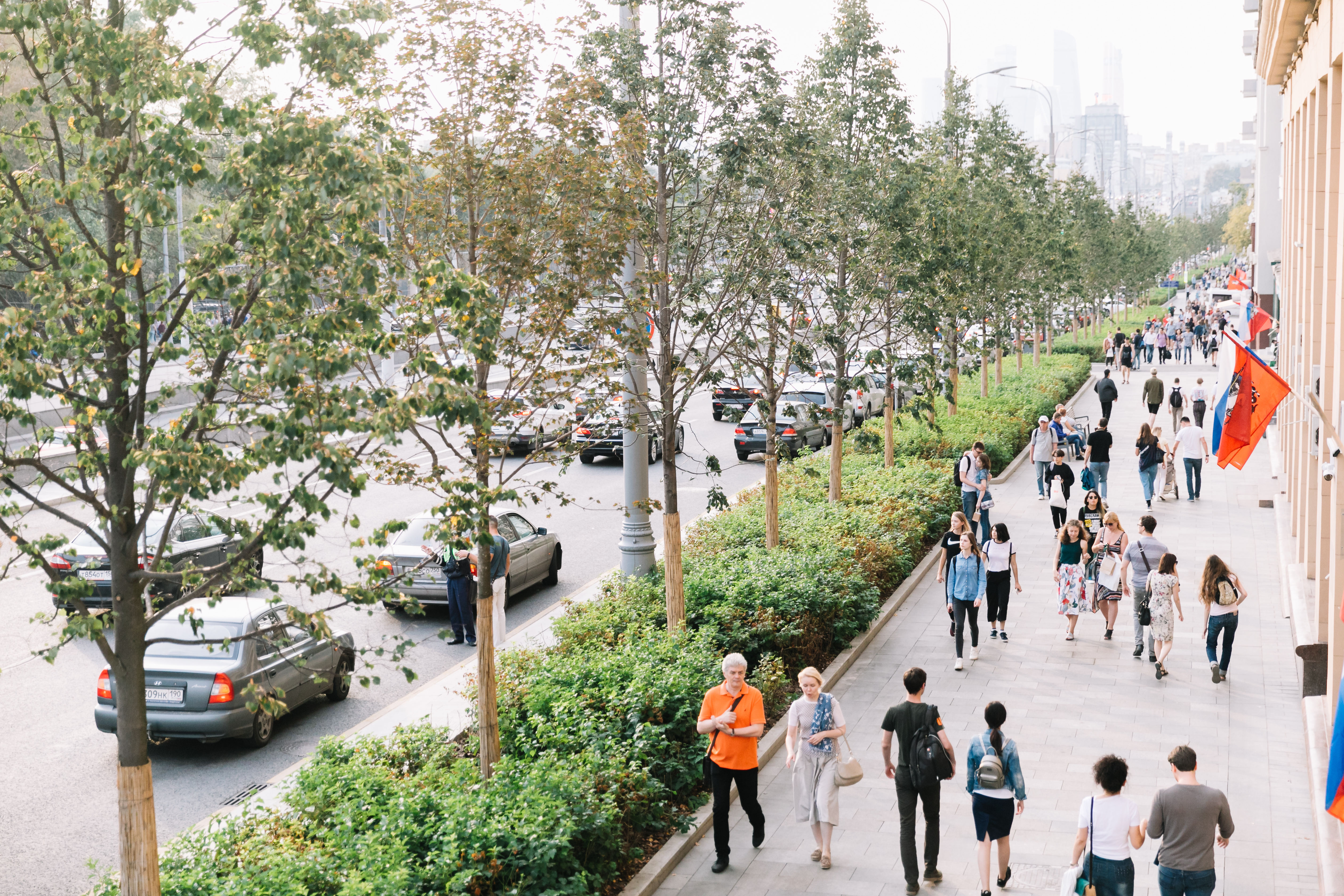 Фрагмент Садового кольца после реконструкции